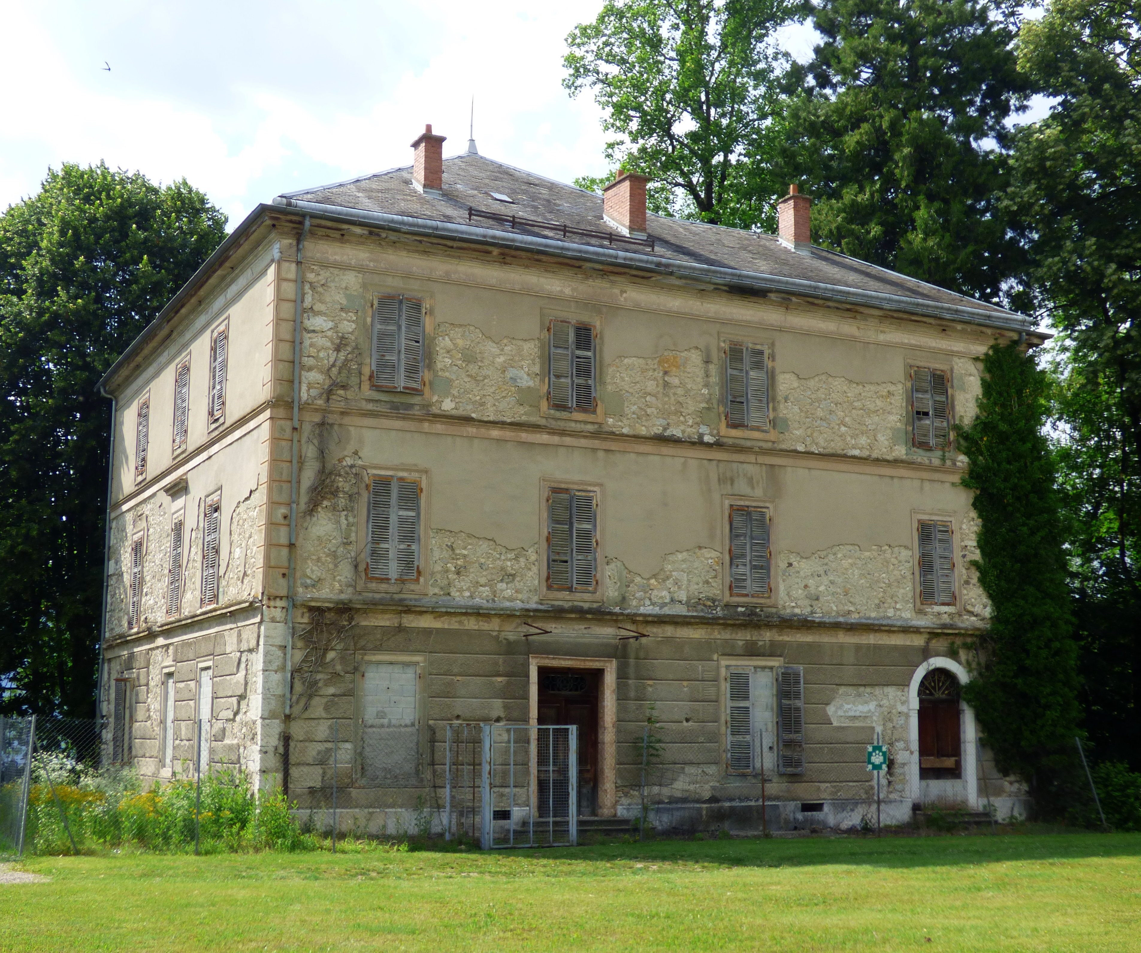 La villa Chevalley, dans le parc des thermes éponymes à Aix-les-Bains.